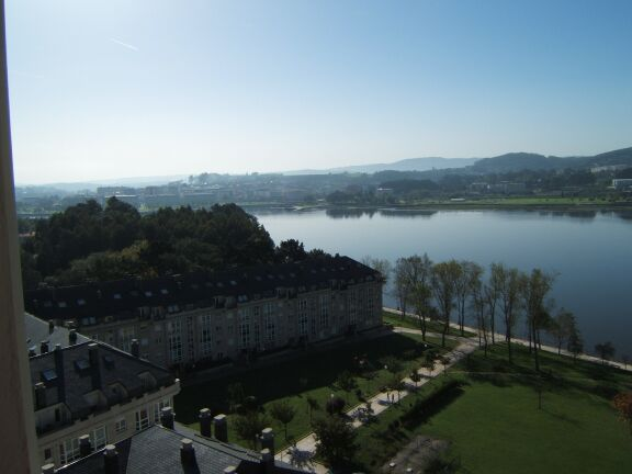 Foto van de Ria de O´Burgo, vanuit appartament, genomen op 28/10/2006 Eigen werk